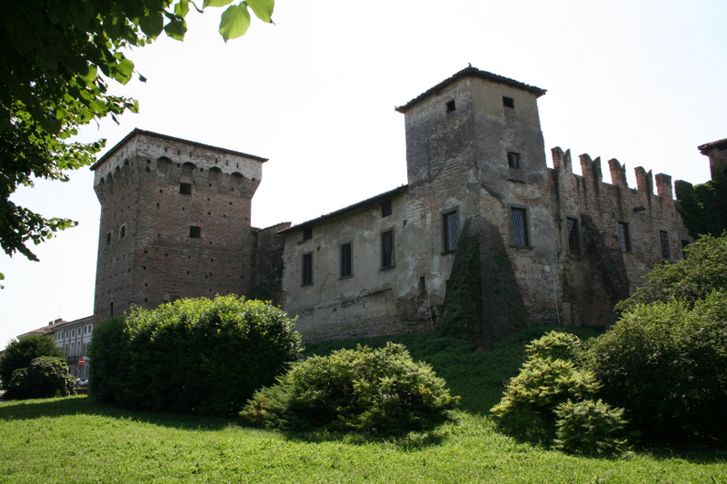 Romano di Lombardia (Bg), il castello.